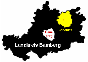 Stadt Scheßlitz im Landkreis Bamberg